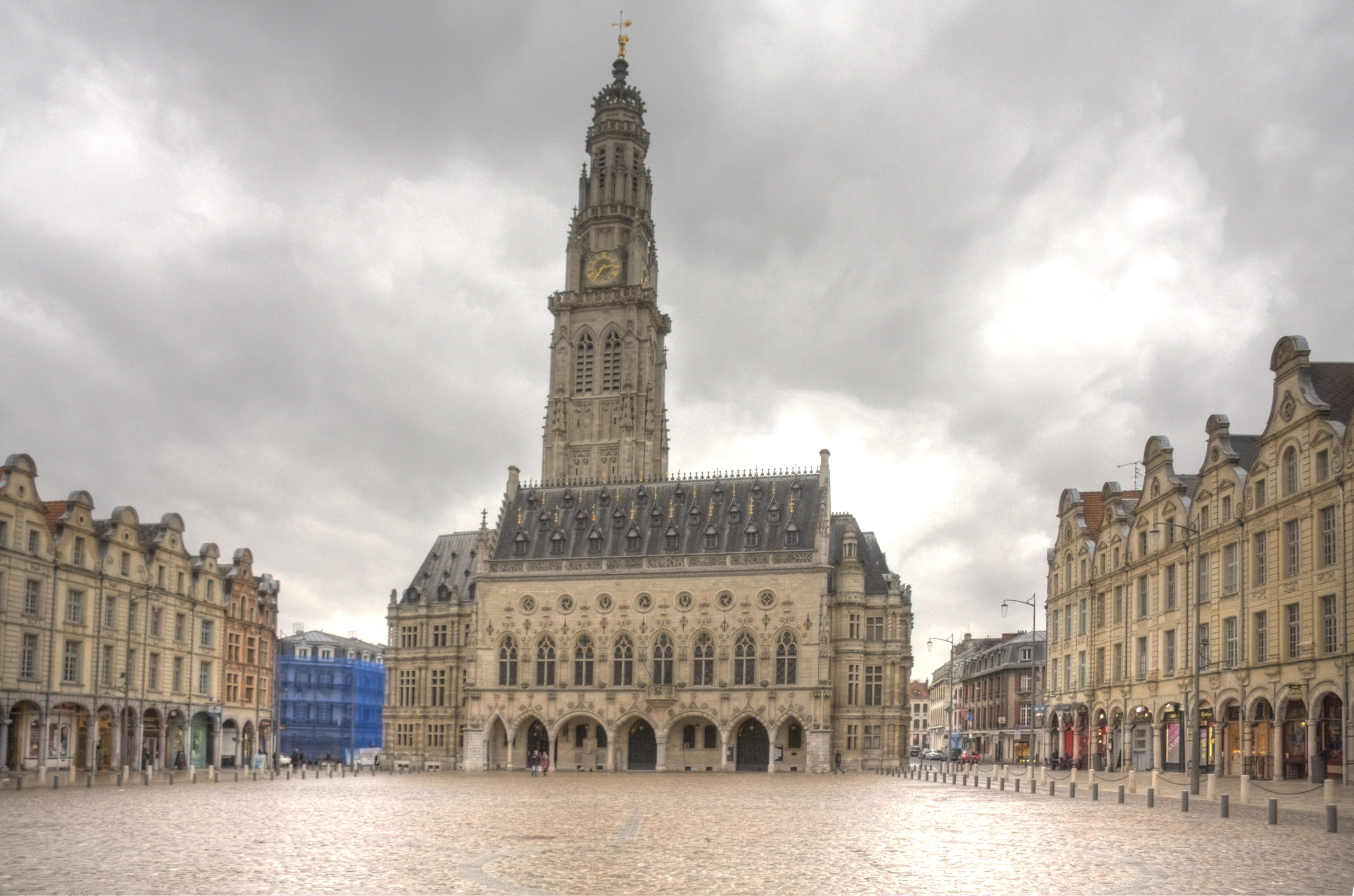 La place des héros débarrassée des voitures